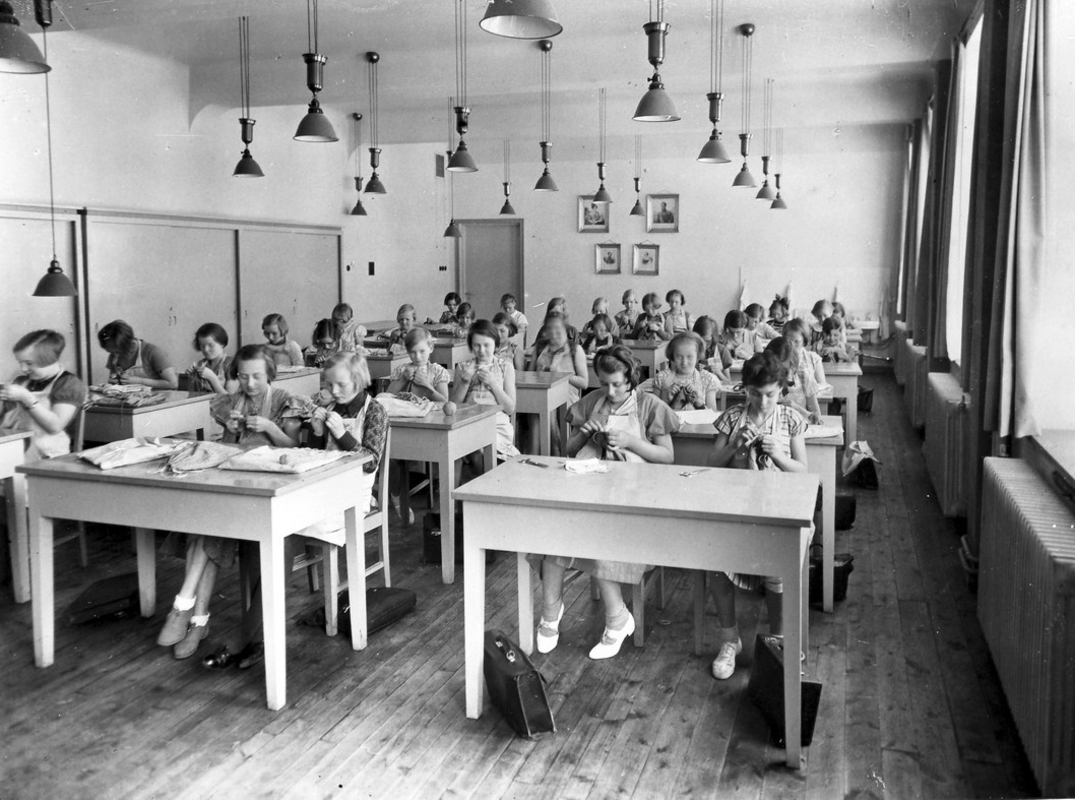 Håndgerningsrum i 3dje etasje, Møllergatens skole. Jenteklasse, jenter som syr, håndarbeid.